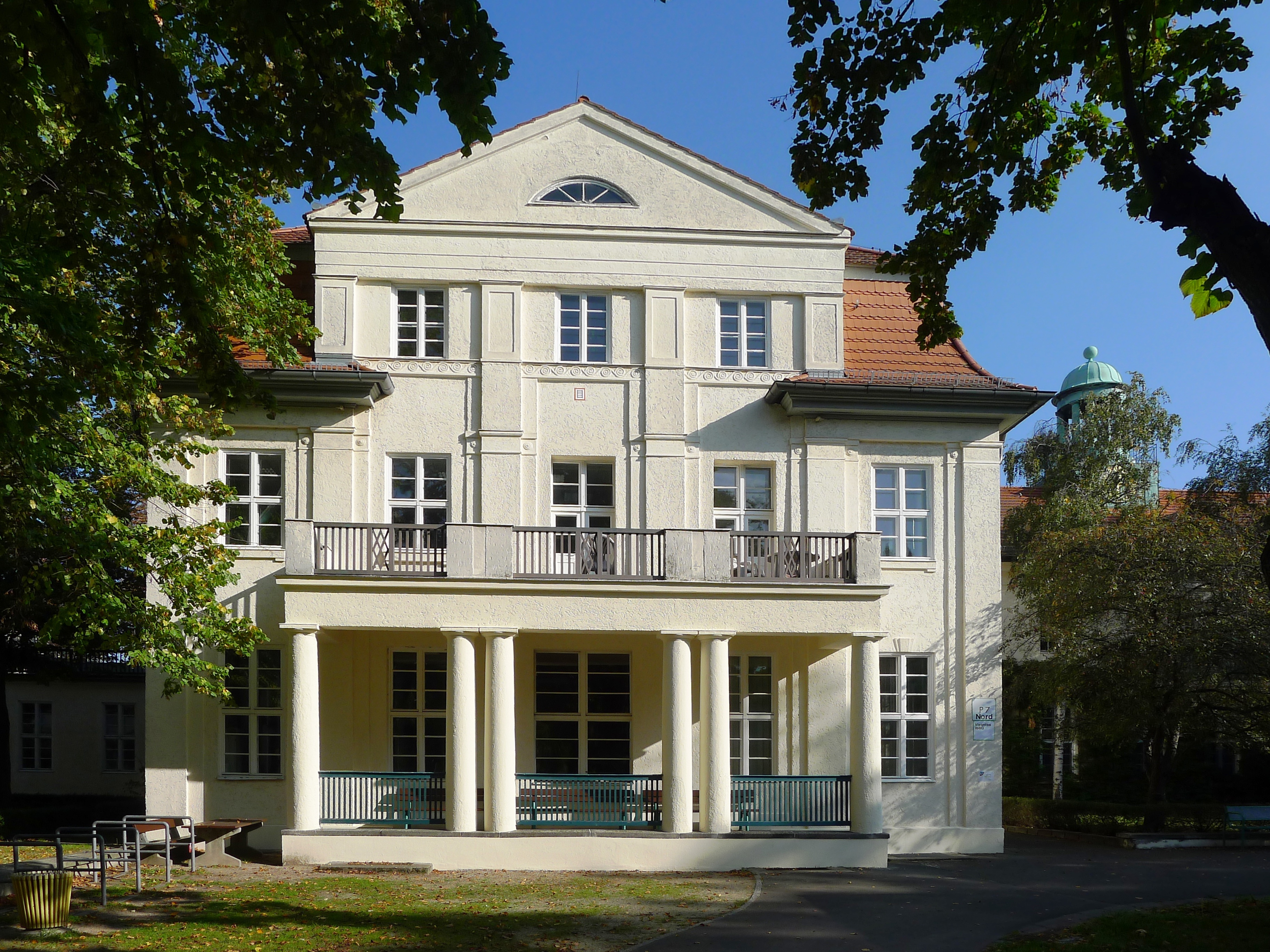 Krankenhaus Rückseite